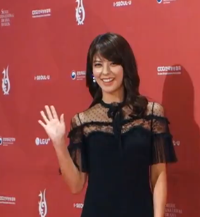 9월 3일 오후 서울시 영등포구 여의도 KBS홀에서 제 13회 서울드라마어워즈 2018이 개최됐다. 본 시상식에 앞서 레드카페 행사가 열려 일본에서 찾아 온 후지이 미나와 오타니 료헤이가 포토타임을 갖고 있다.